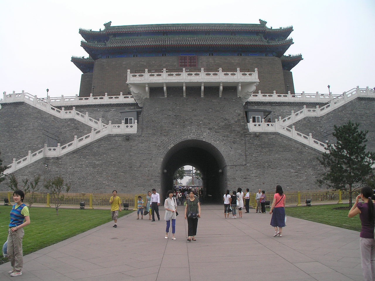 天安門広場前門裏側